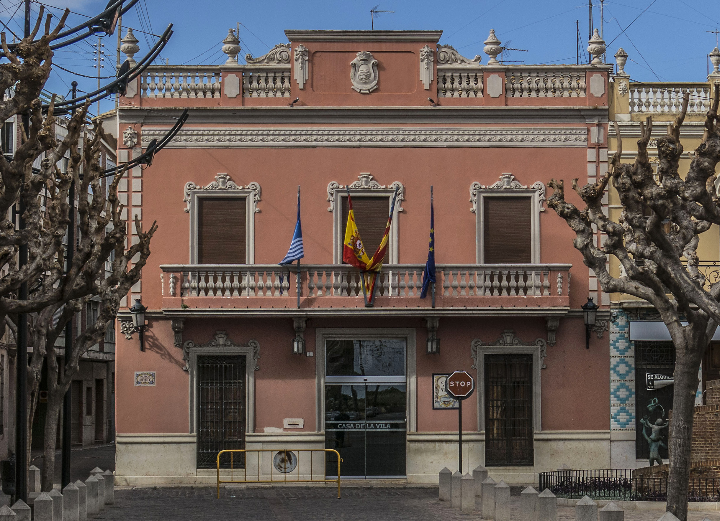 Albalat de la Ribera és un municipi del País Valencià, a la comarca de la Ribera Baixa.